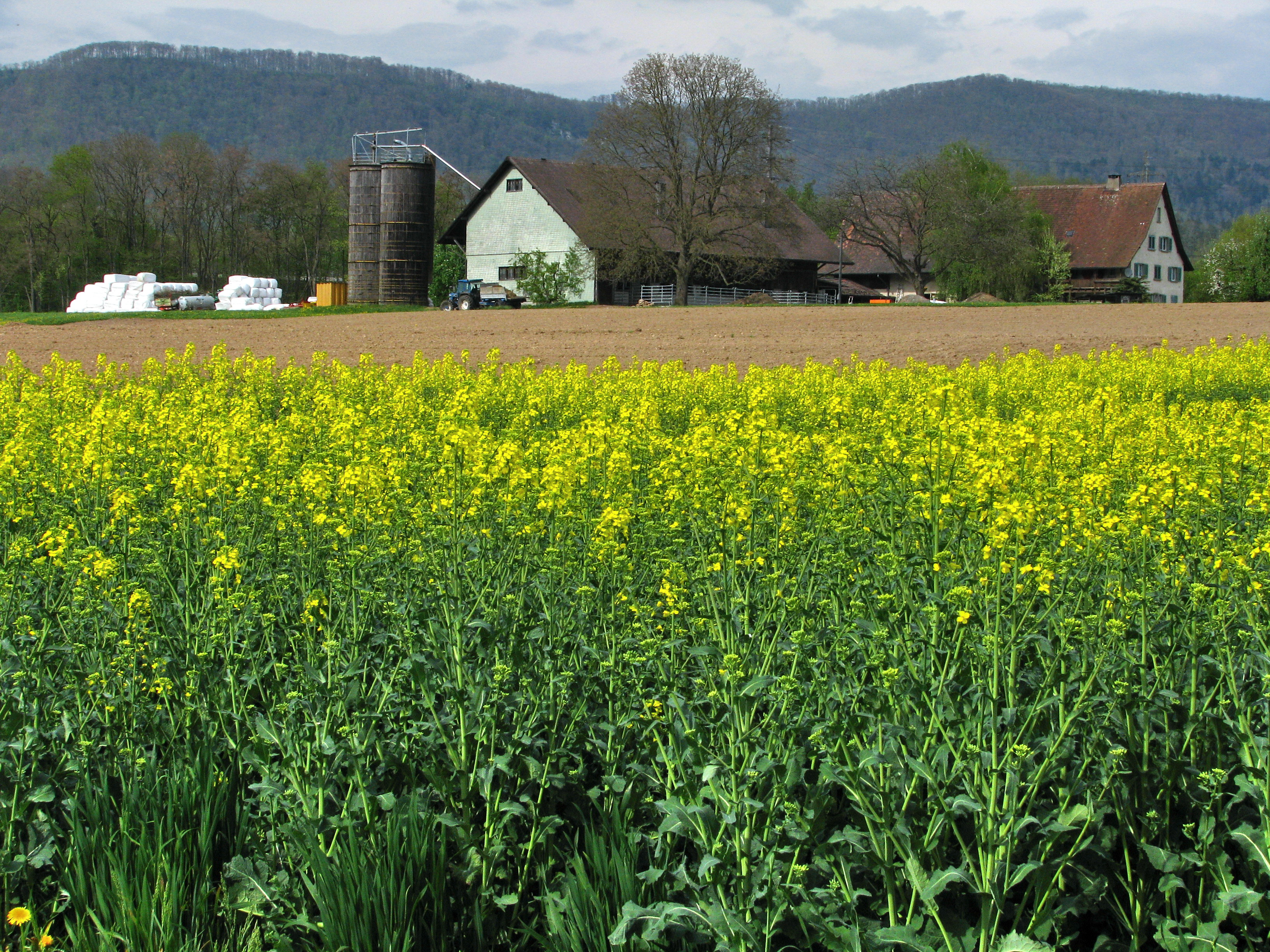 Between Würenlos and Wettingen